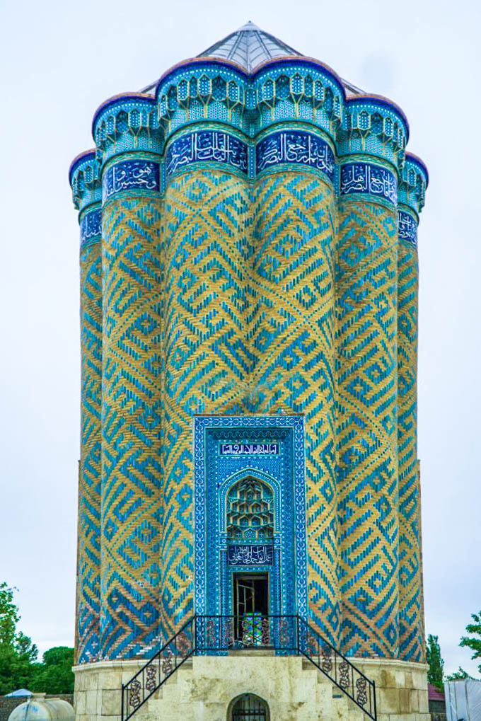 Qarabağlar türbəsi restavrasiyadan sonra